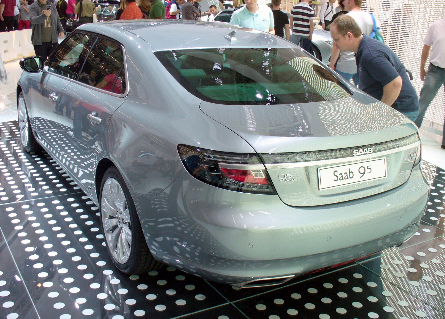 Saab 9-5